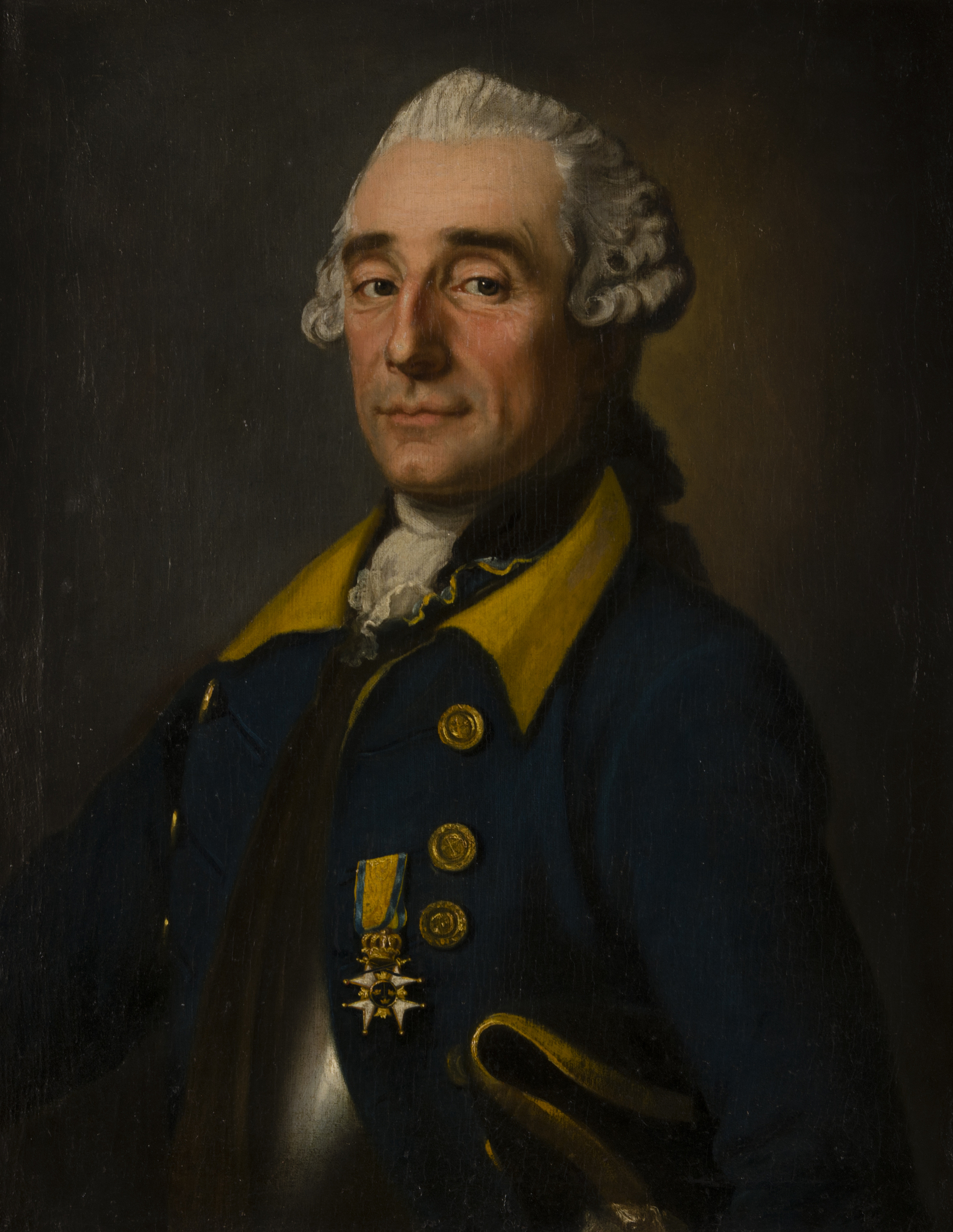 Porträtt föreställande kaptenen Arvid von Göben (1713-1794) i uniform m/1765 för Dalregementet. Von Göben bär på bröstet även riddartecknet av Svärdasorden, samt en tricorne under armen. Målning från 1796 av Karl Fredrik Brander.